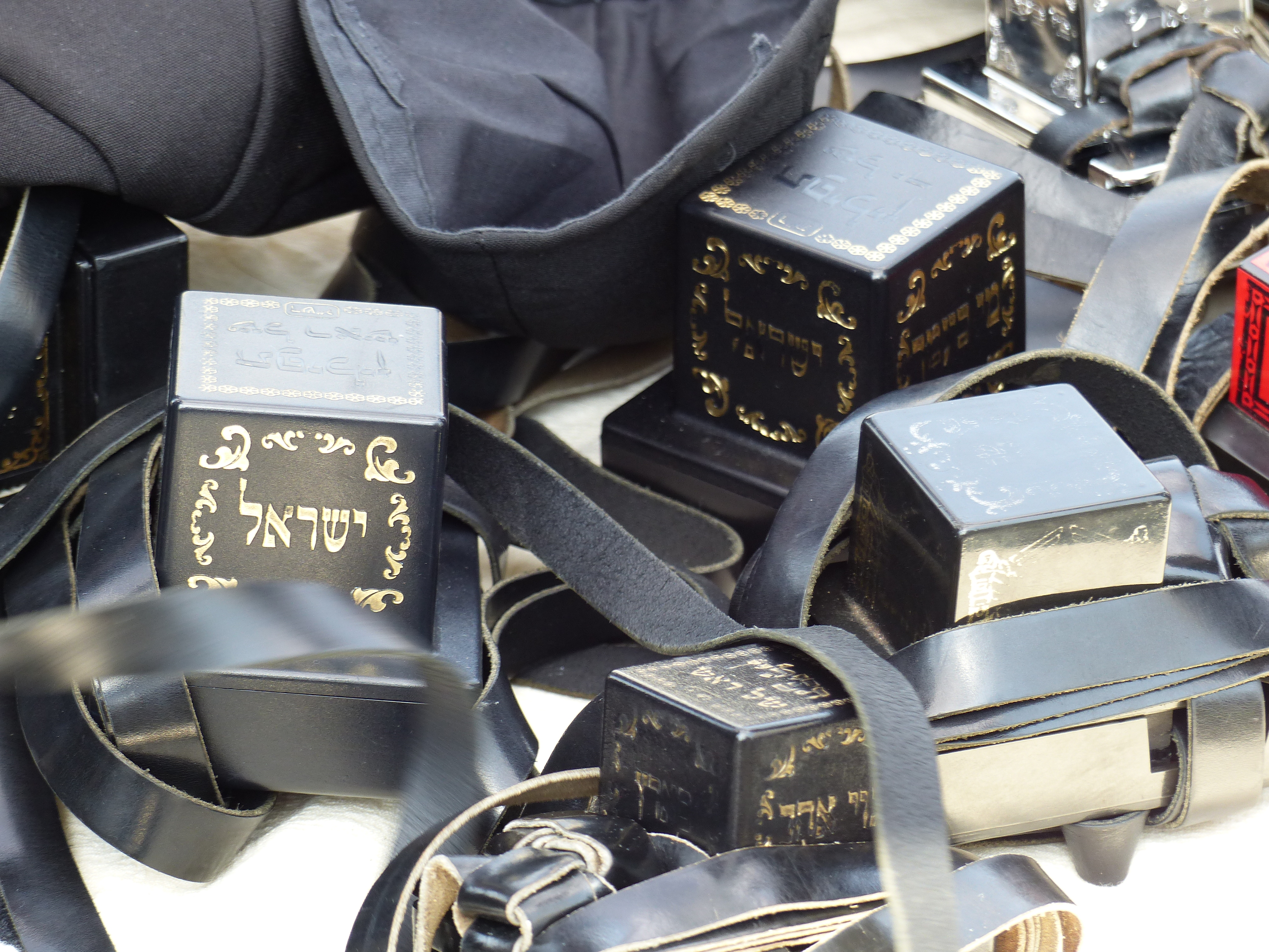 Tefillin, Jerusalén